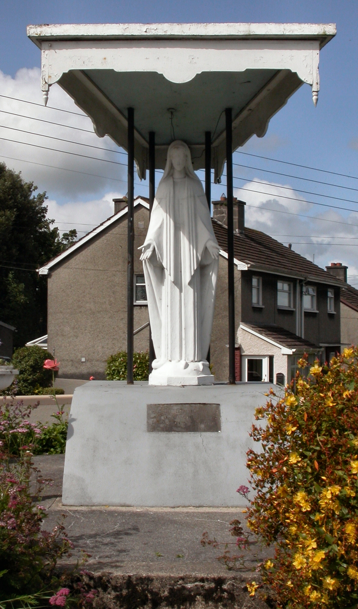 Scrin Mhuire, Luimneach